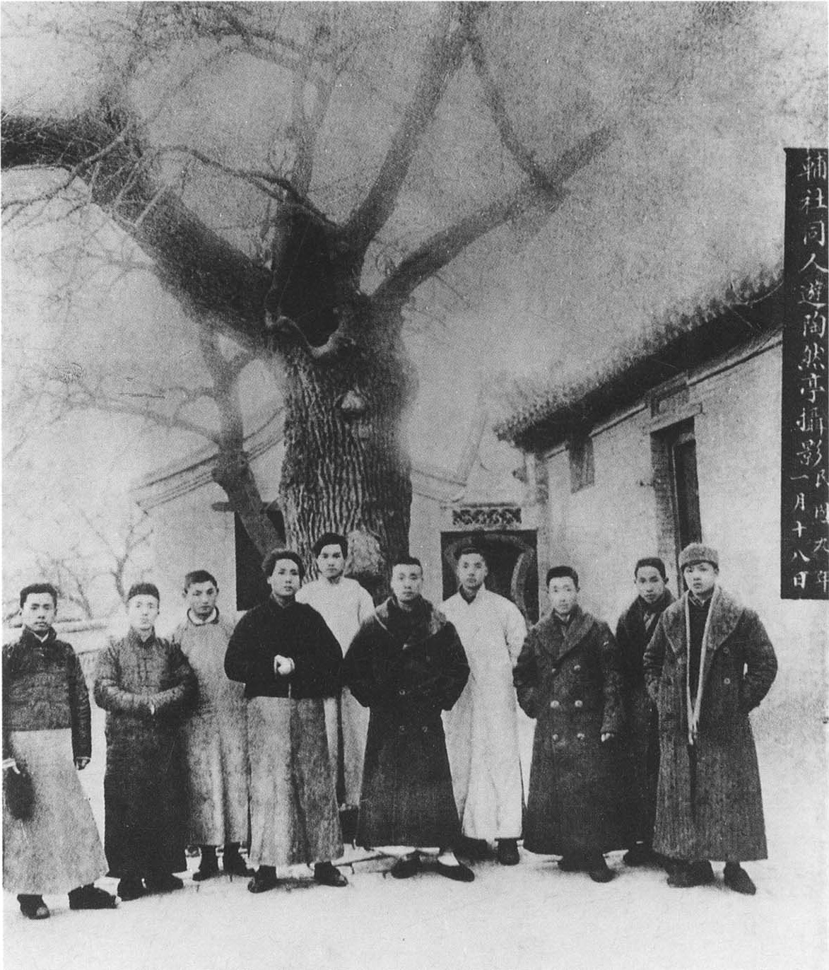 中文（中国大陆）: 1920年1月18日，辅社在京成员北京慈悲庵合影，左四为毛泽东